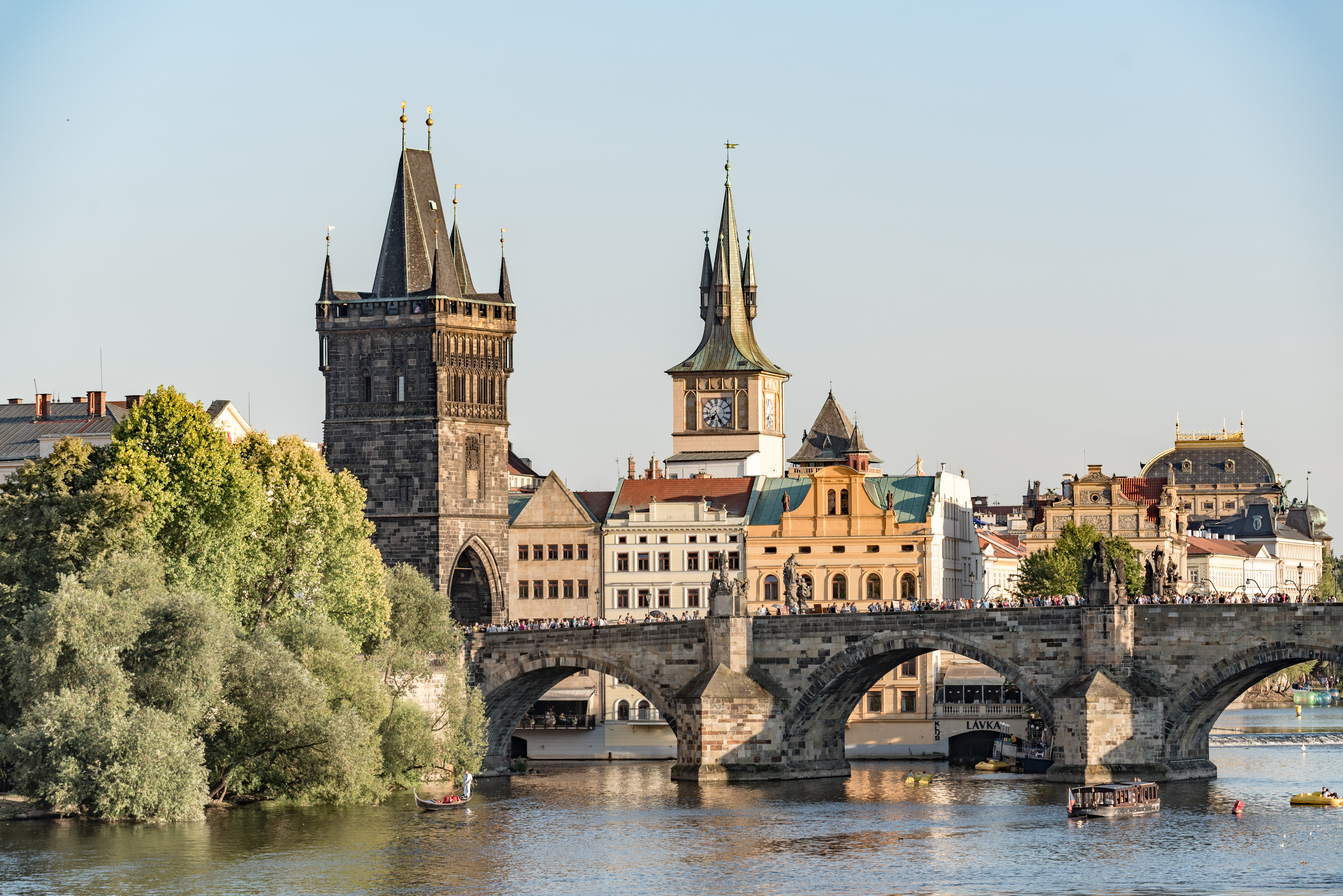 Praha, Staré Město, Karlův most